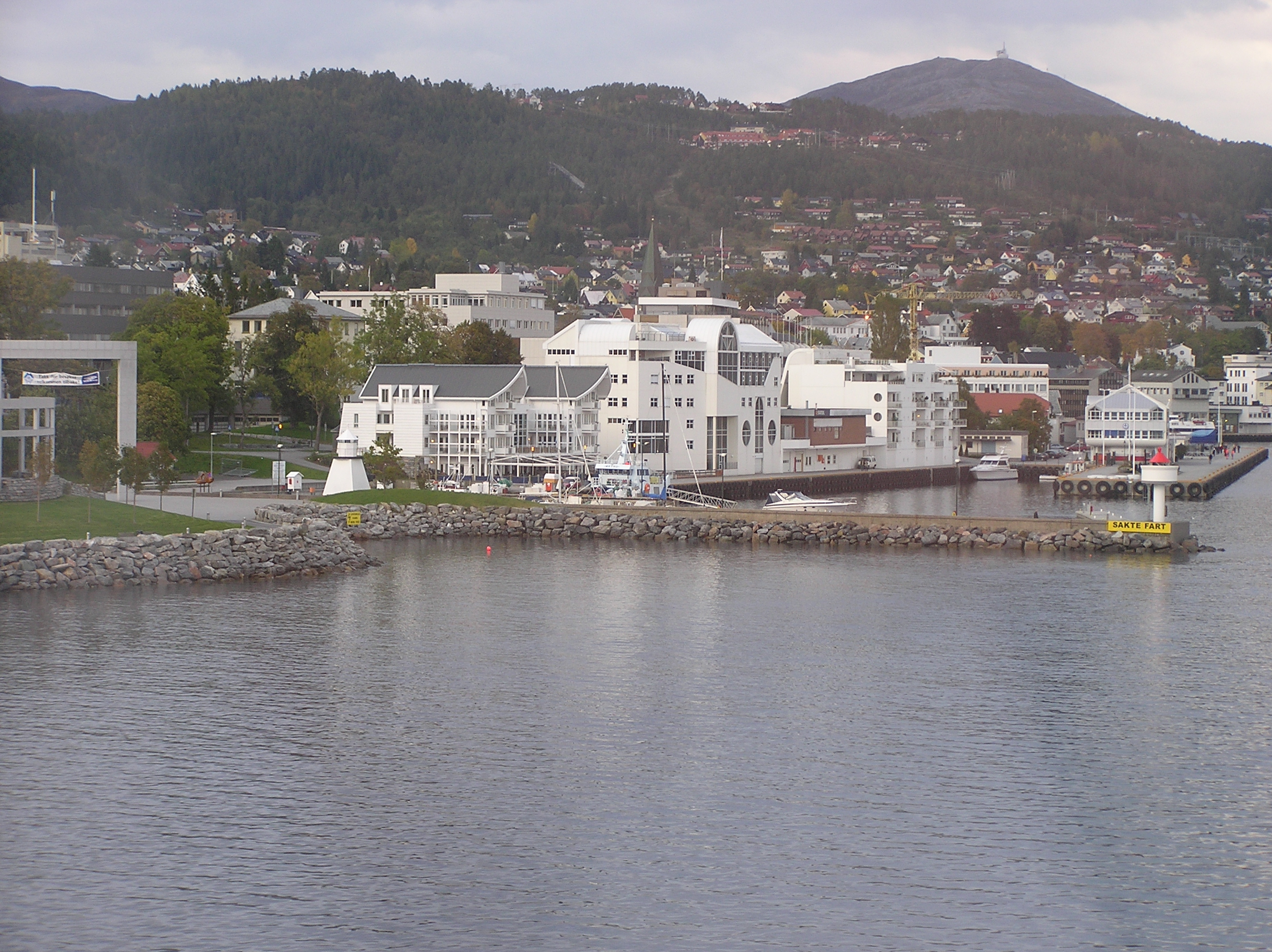 Molde